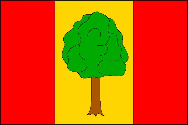 Vlajka obce Doubravice nad Svitavou